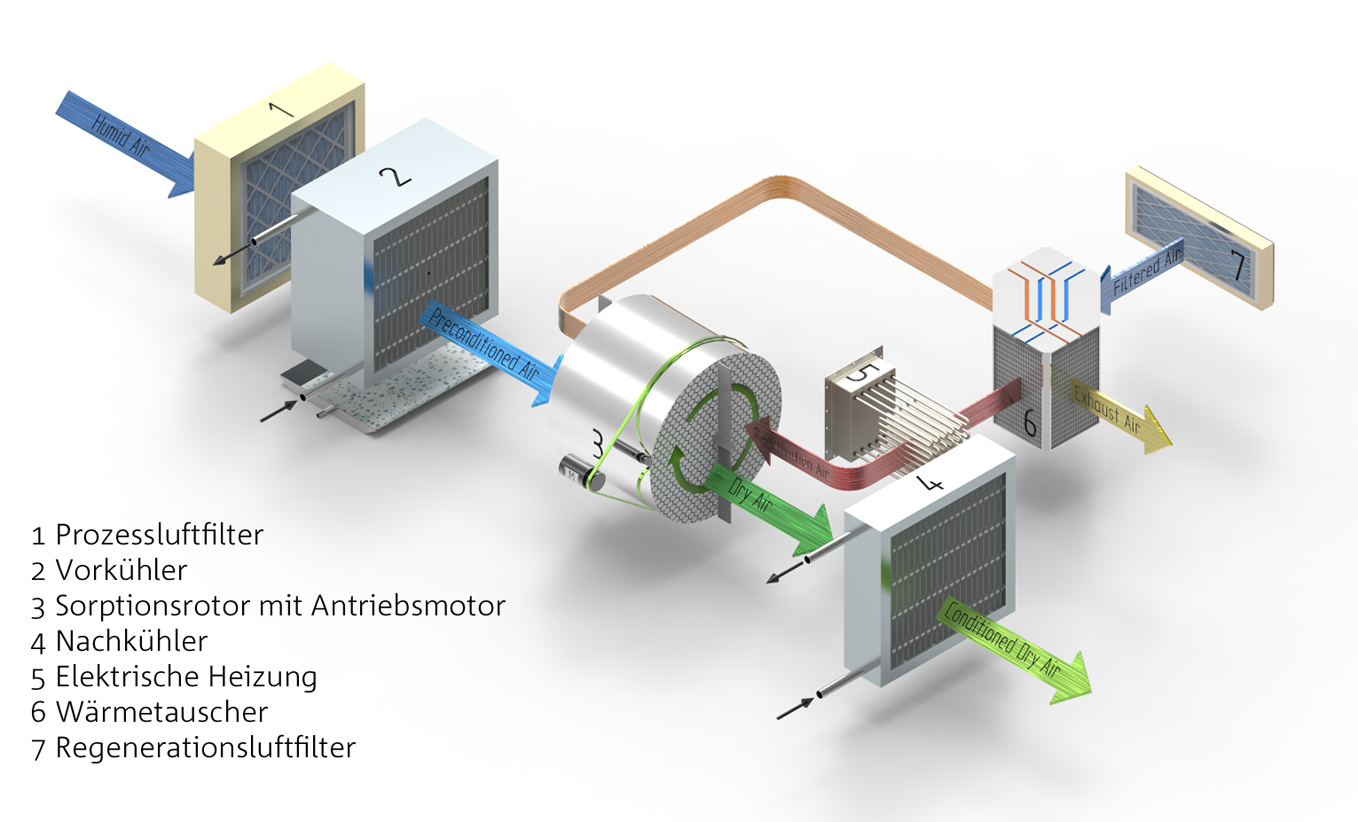 Prozessschema Rotationsentfeuchter mit Luftfilter, Vorkühler, Sorptionsrad, Nachkühler, Heizung, Wärmetauscher und Regenerationsluftfilter